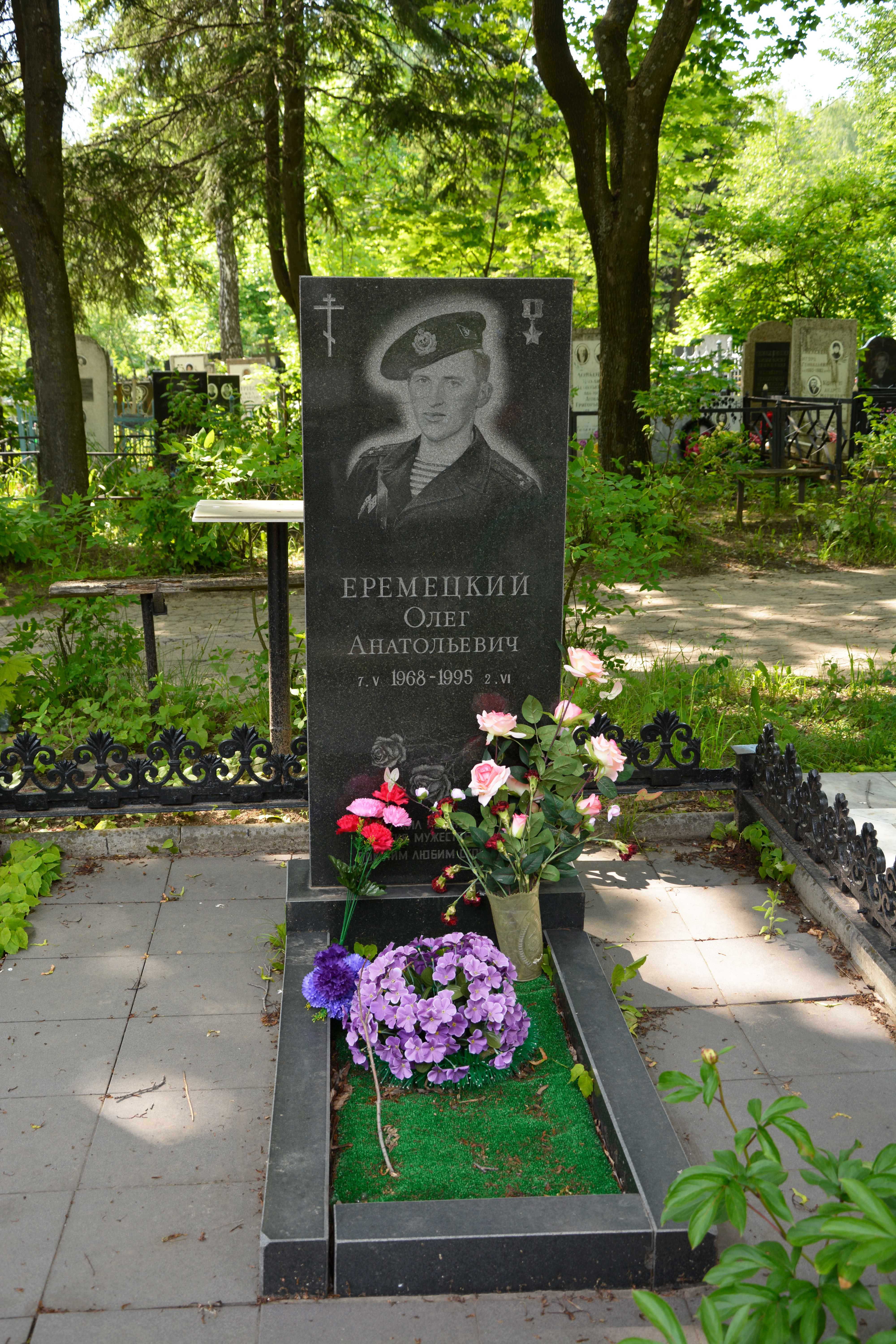 Могила Героя Российской Федерации Еремецкого Олега Анатольевича на Новогражданском кладбище г. Рязани. 10 июня 2020 г.